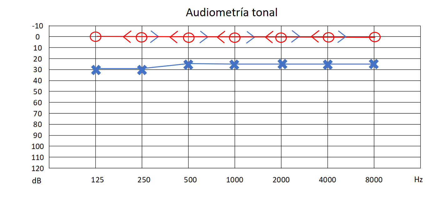 Representación de una audiometría tonal hecha con audiómetro clínico para fines prácticos.